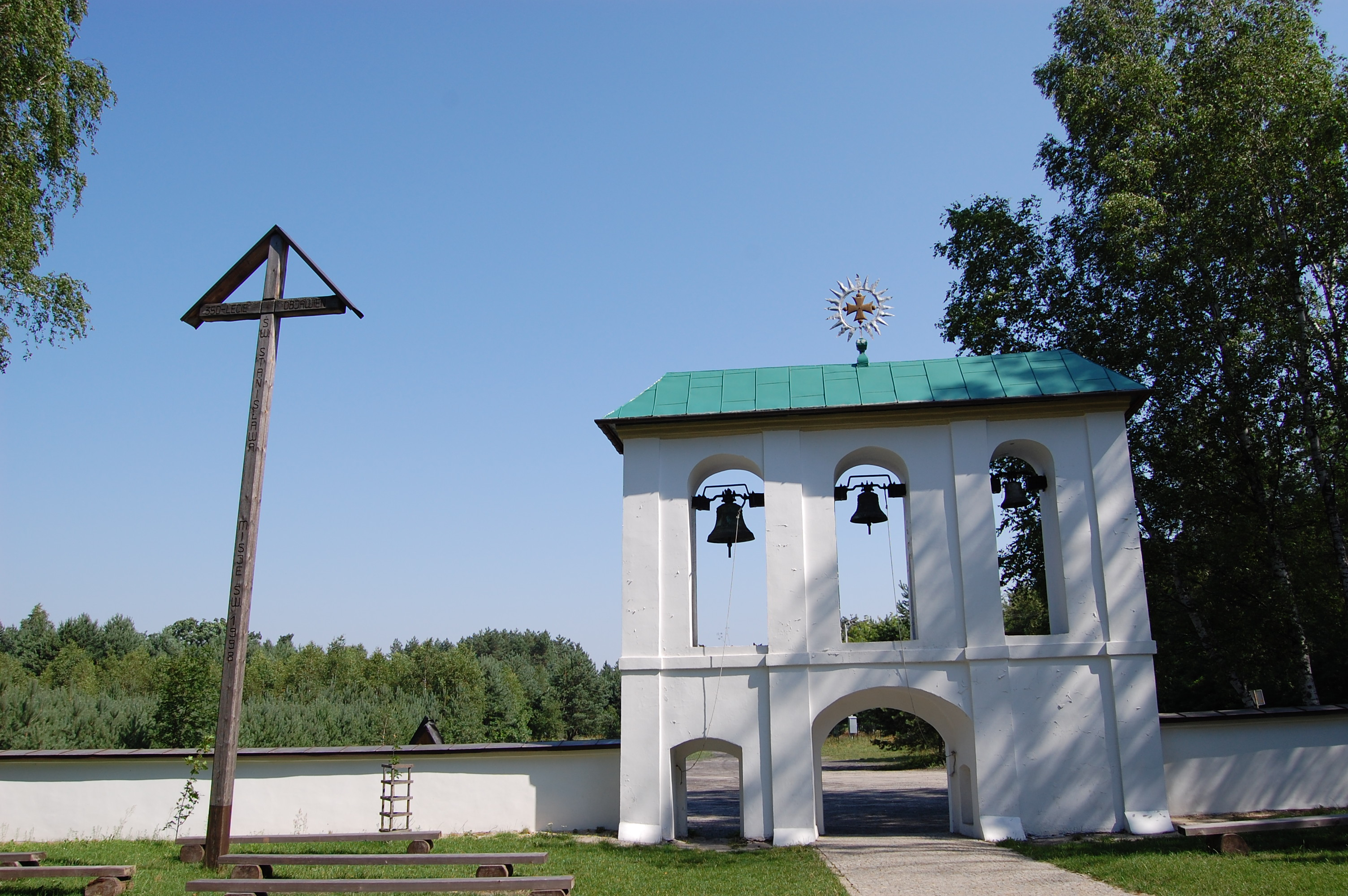 Dzwonnica (1877) i krzyż przed kościołem w Górecku Kościelnym.